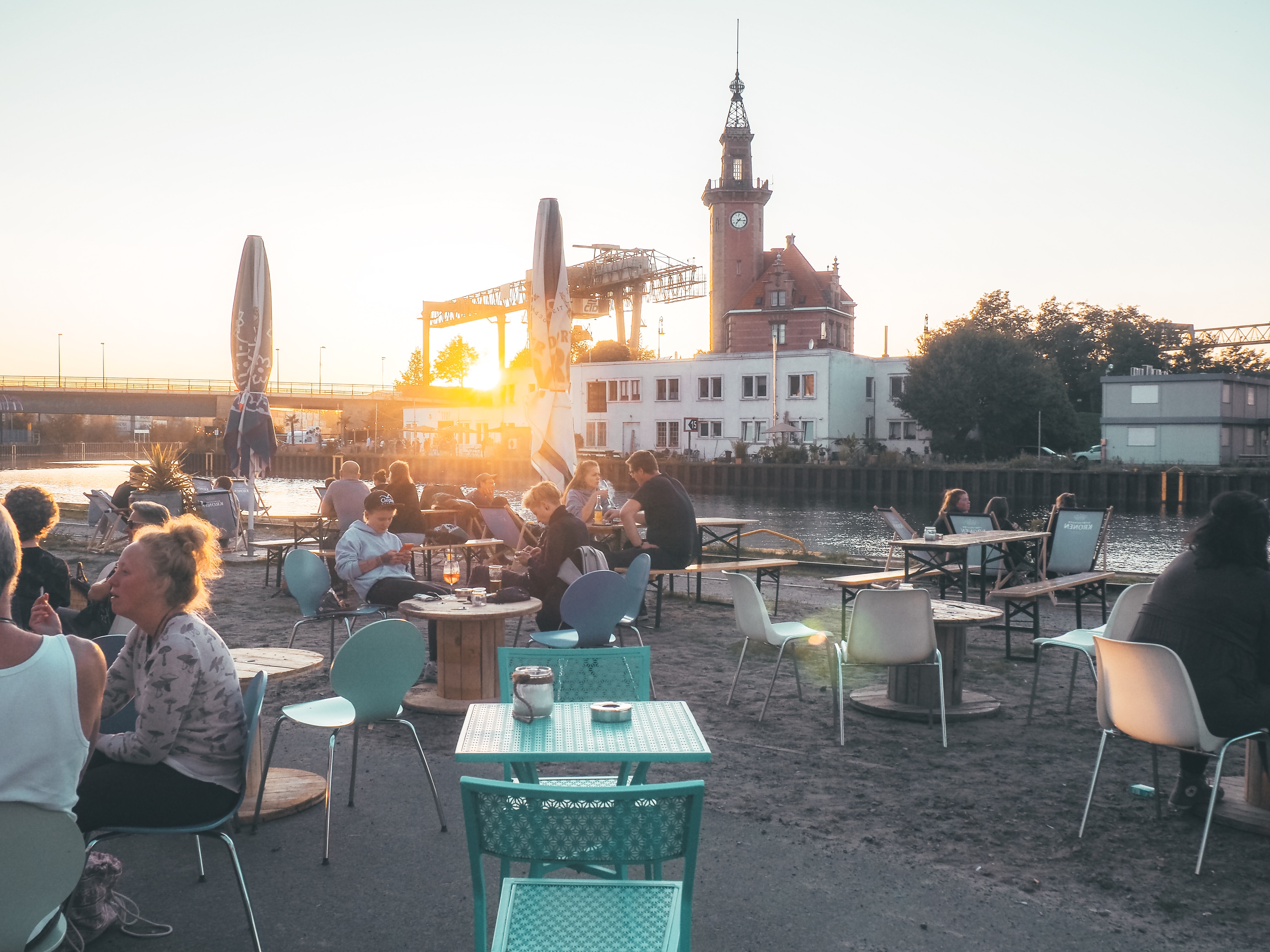 Szenegastronomie am alten Hafenamt